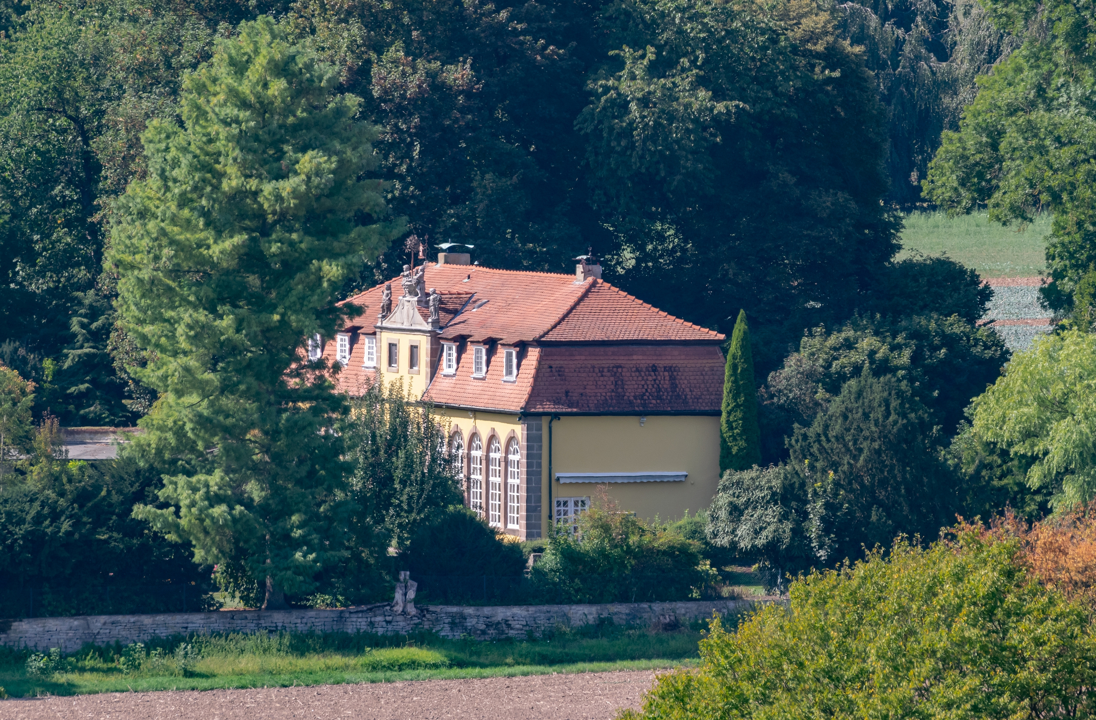 Orangerie von Schloss Welda, Warburg